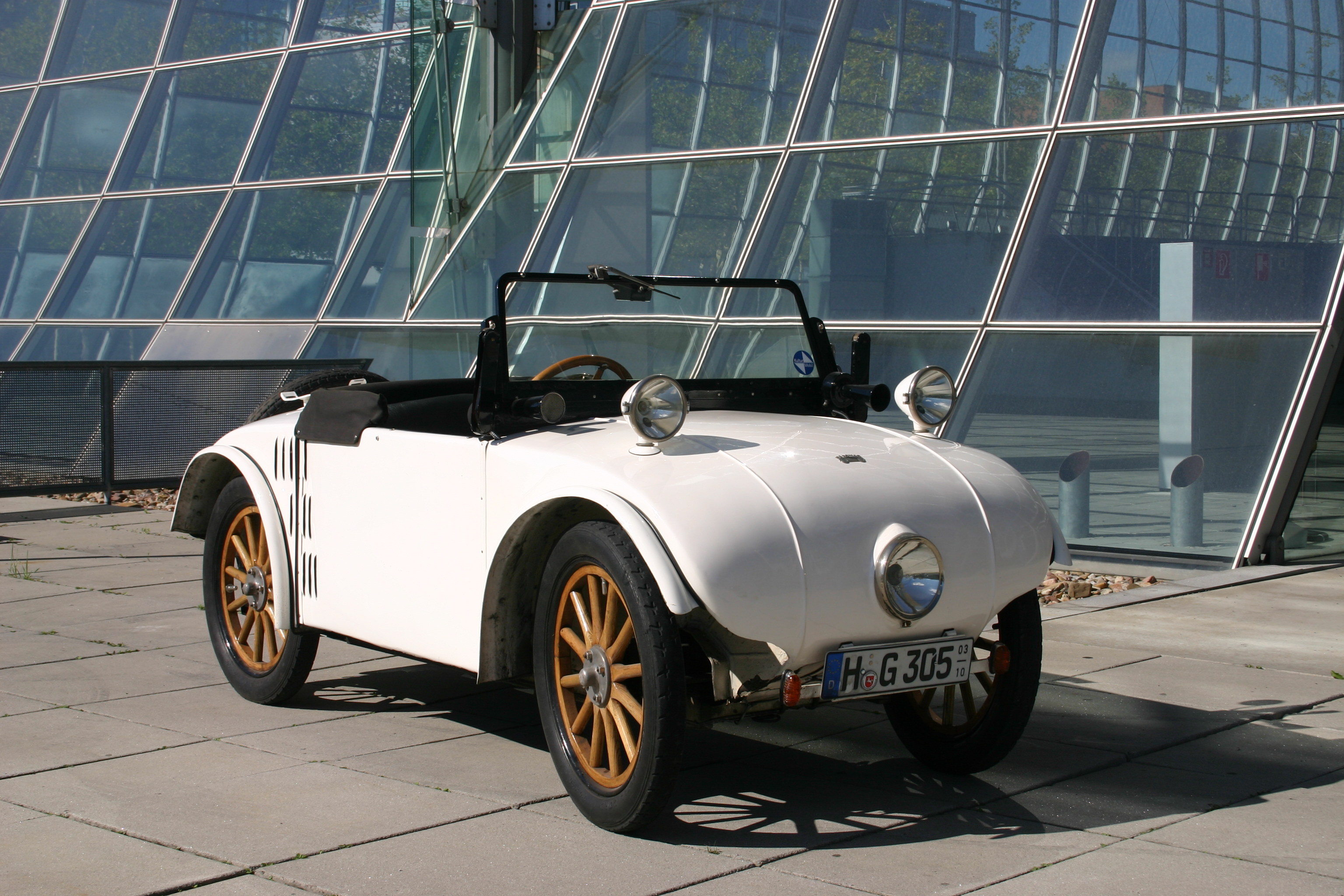 Hanomag 2/10 PS vor deutschem Pavillon, Expogelände Hannover